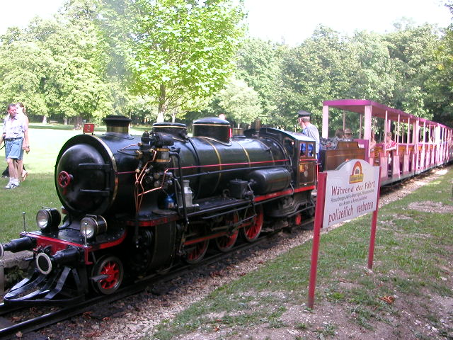 privates Foto von "DE:Benutzer:Häsk" mit Digitalkamera erstellt